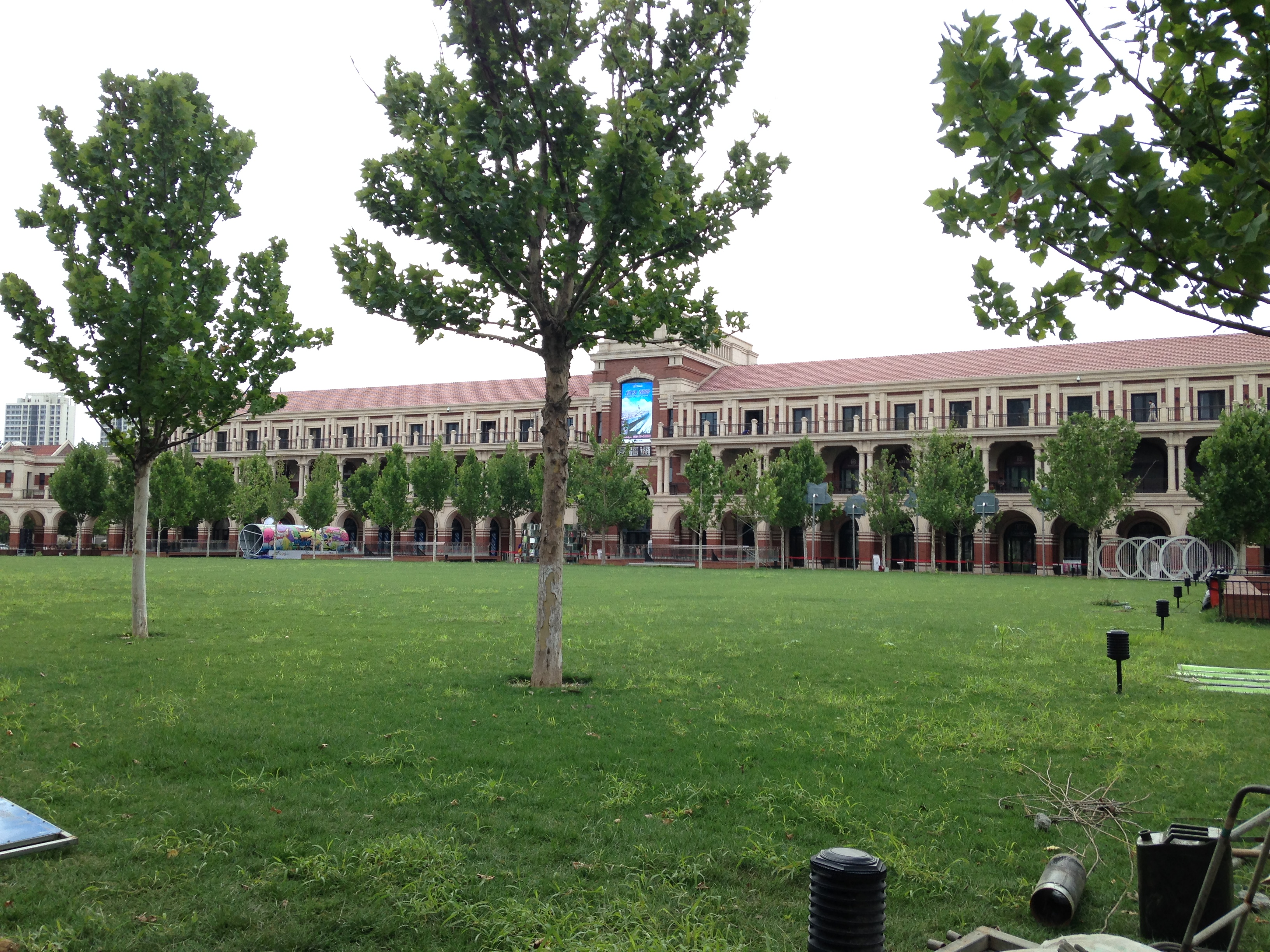 民園体育場